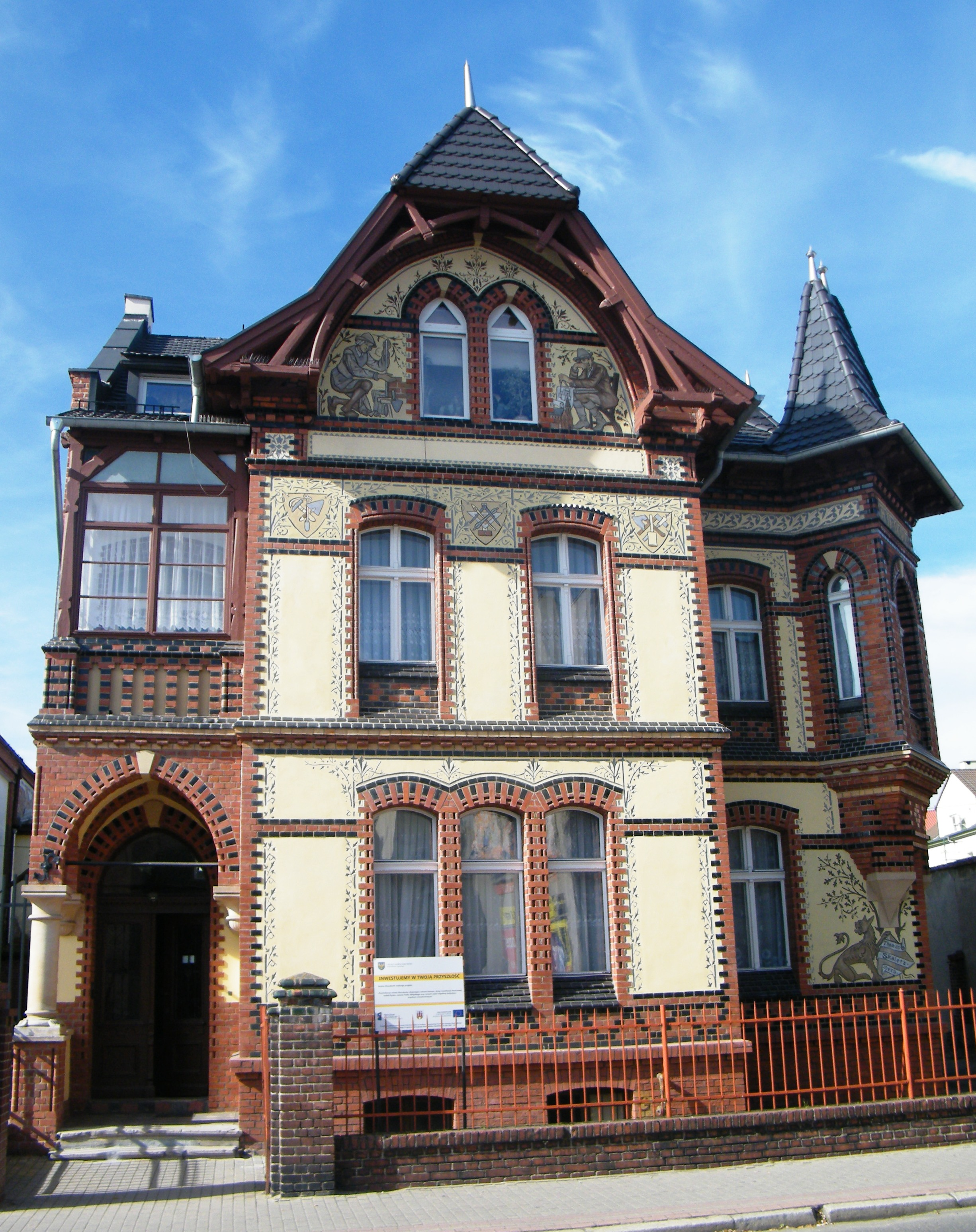 Kluczbork, ul. Pułaskiego 1 - willa Kruga, 1892 (zabytek nr A-24/2003 z 15.10.2003)